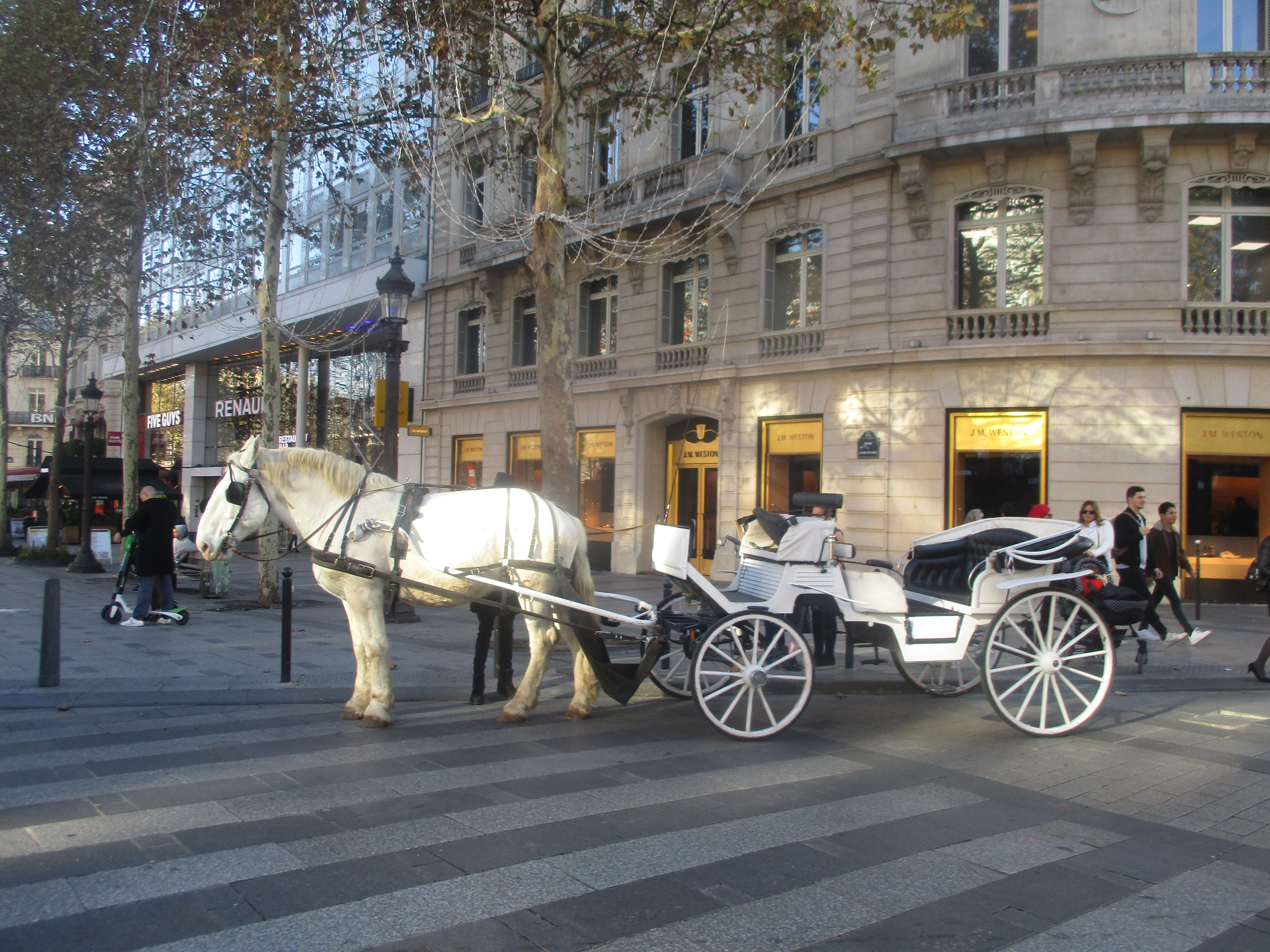 Jument boulonnaise et son fiacre, au coin de l'avenue des Champs-Élysées et de la rue Pierre Charron.